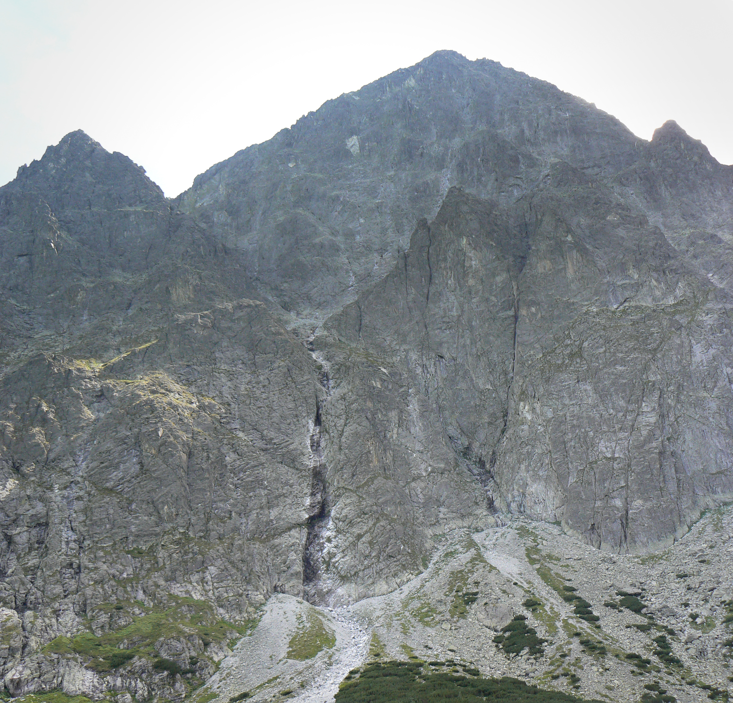 Malý Kežmarský štít